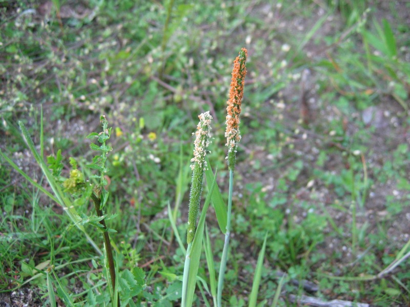 Rotgelber Fuchsschwanz Alopecurus aequalis